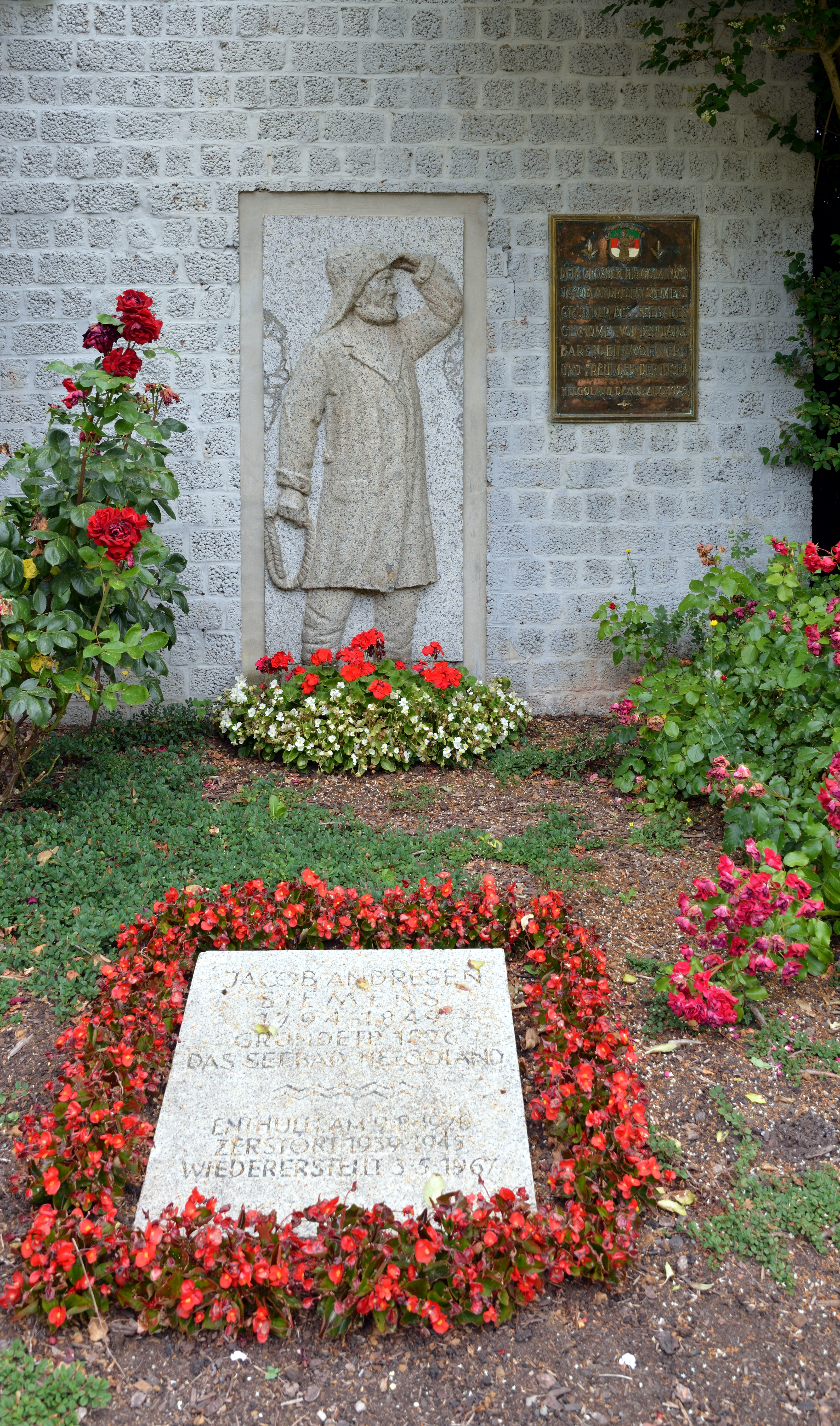 Bilder von Helgoland im Juli 2019Denkmal für Jacob Andresen Siemens, dem Gründer des Seebades Helgoland